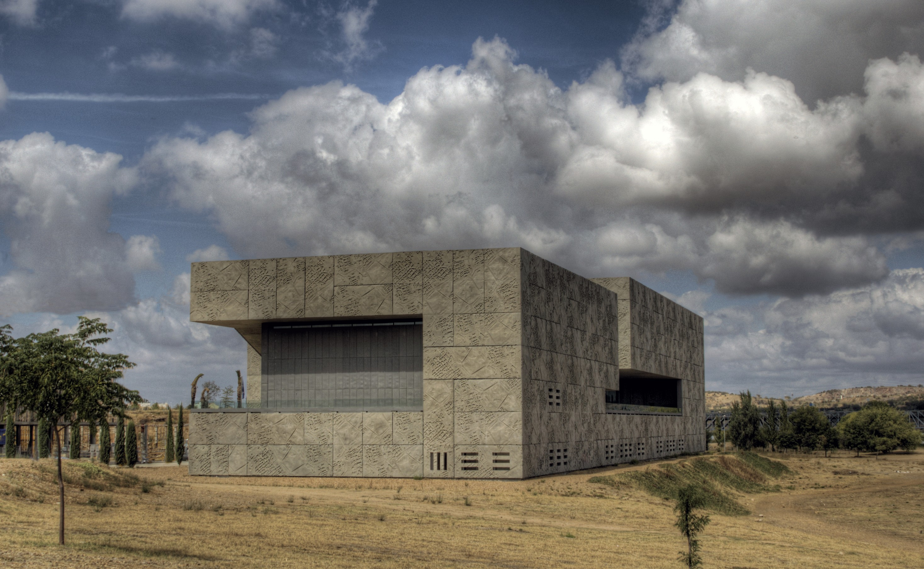 Palacio de Congresos de Mérida, Spain.